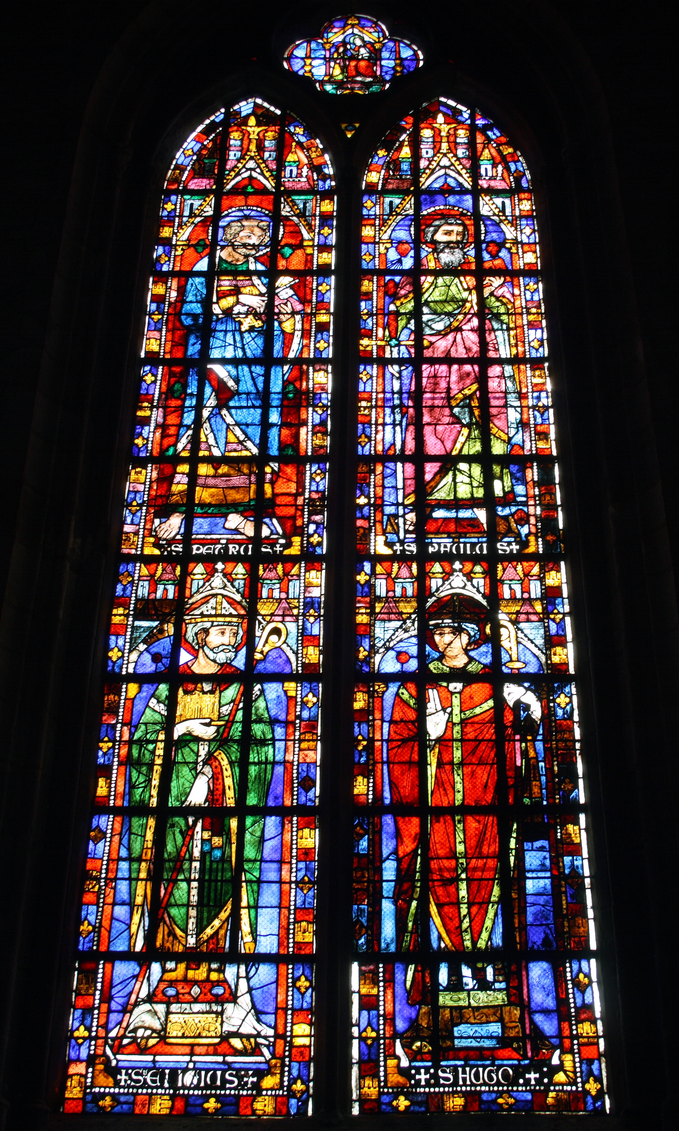 Kirche Sainte-Anne in Gassicourt, einem Stadtteil von Mantes-la-Jolie im Département Yvelines (Region Île-de-France/Frankreich), Bleiglasfenster (baie 2) von 1260/70, Darstellung: Heiliger Eligius (unten links), heiliger Hugo (unten rechts), Apostel Petrus (oben links), Apostel Paulus (oben rechts)